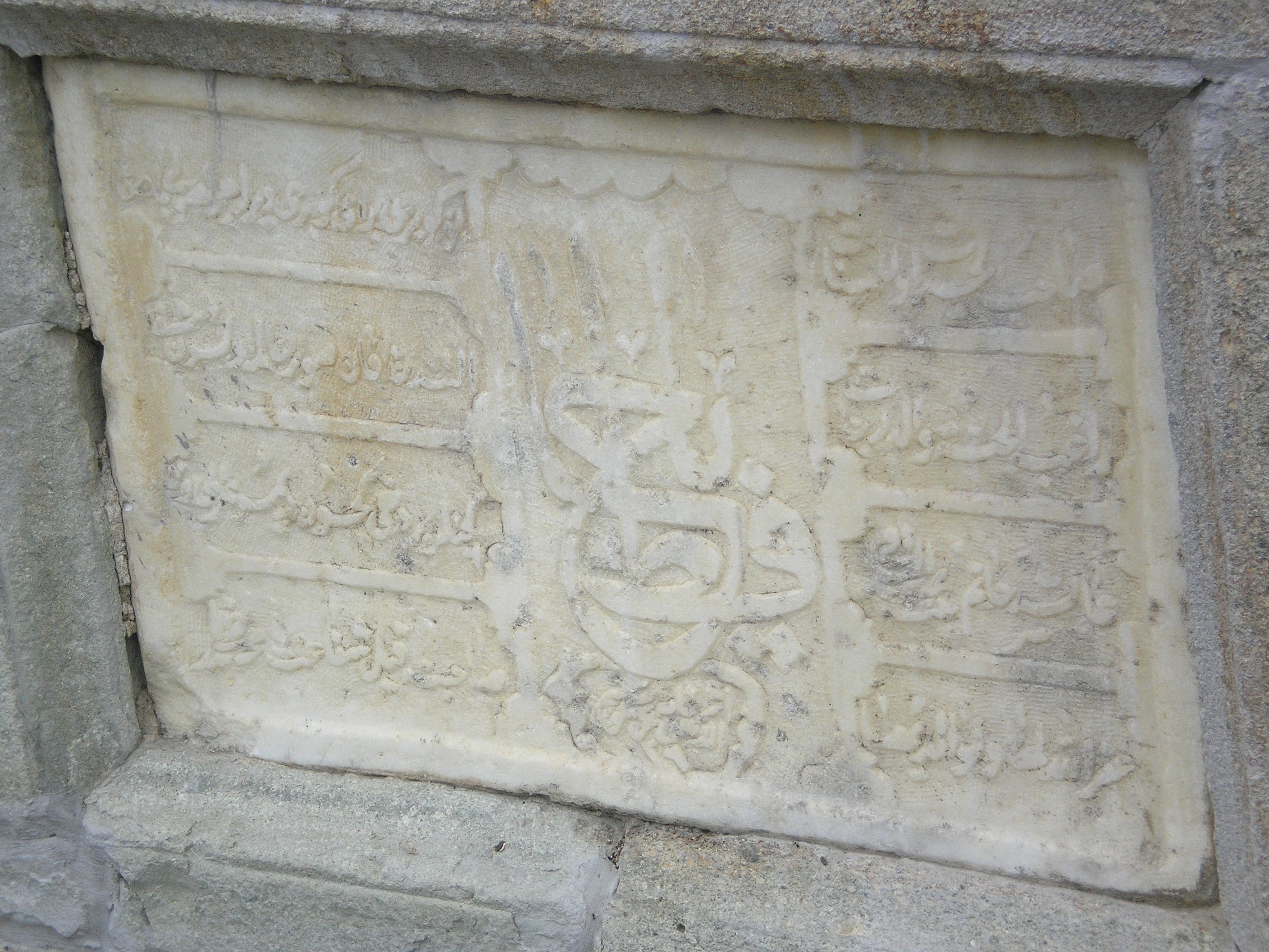 detalj sa Belog Mosta